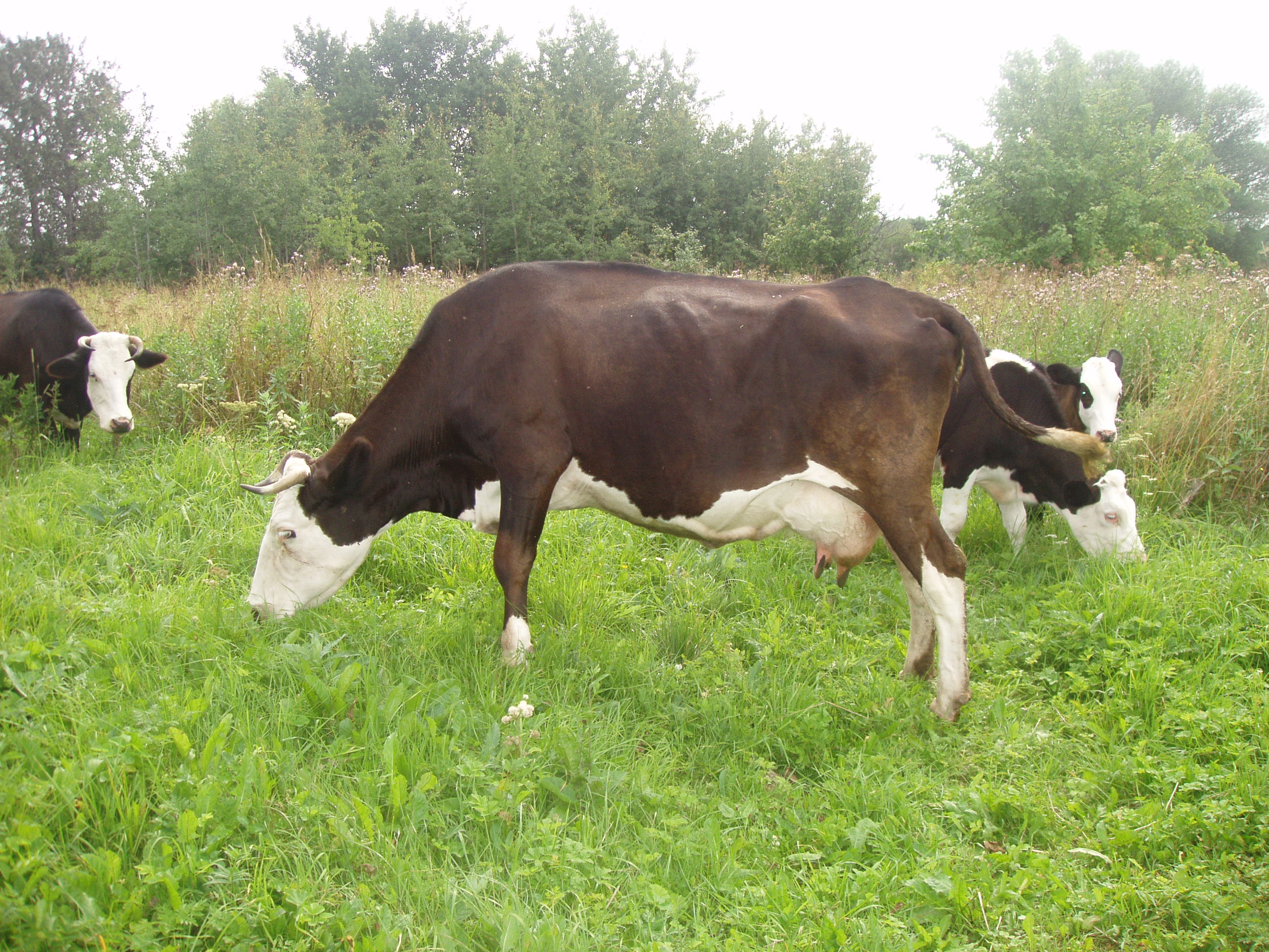 Ярославская порода коров